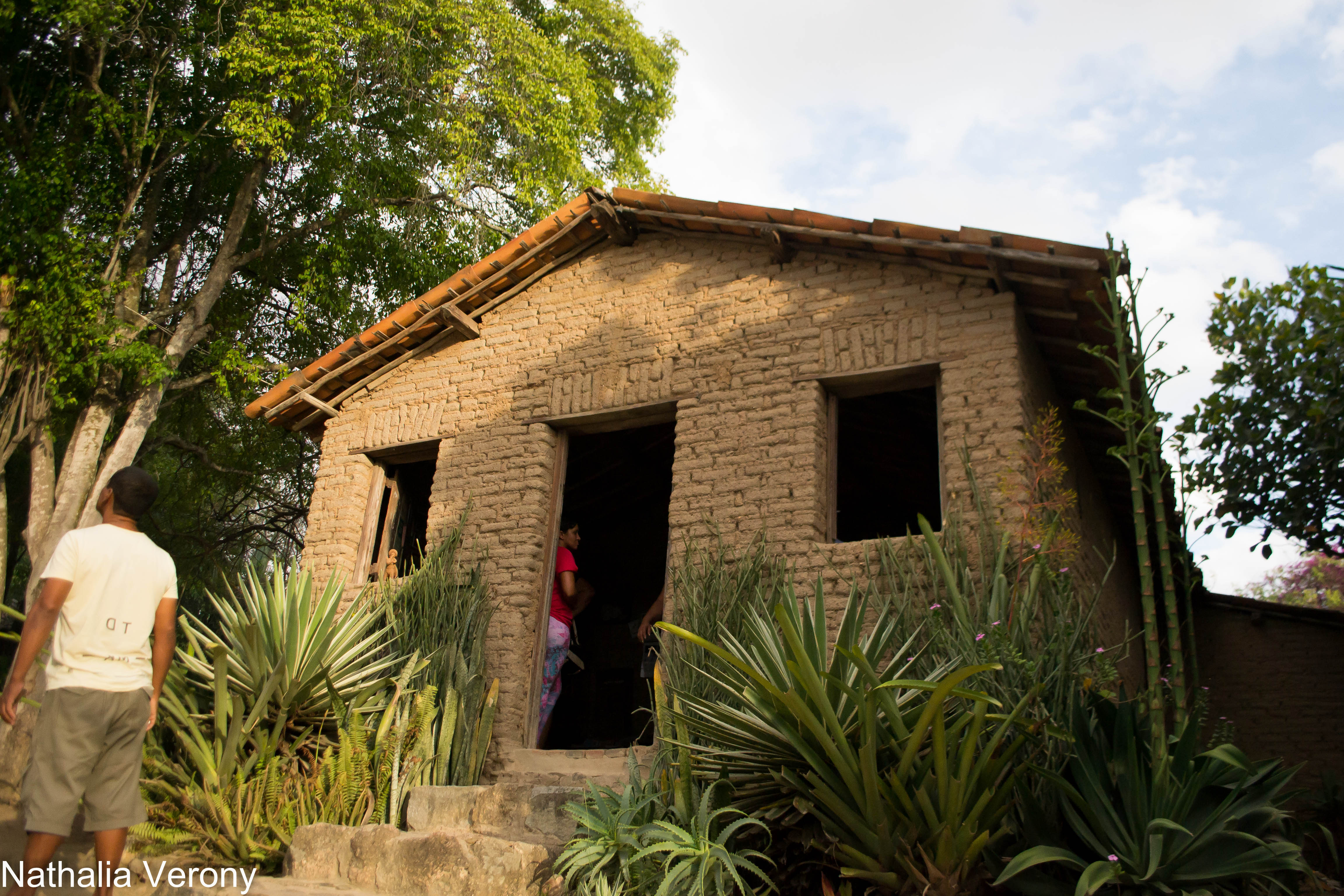 Casa mestre Vitalino - Alto do moura - Caruaru -PE